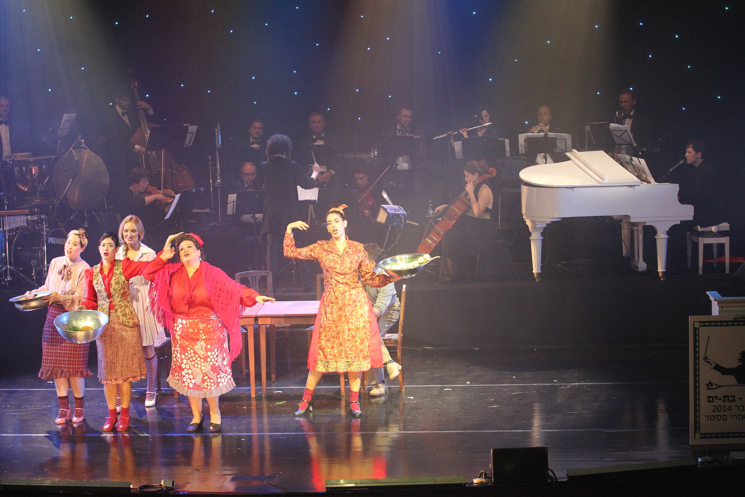 גרטה והמירוץ לחלל